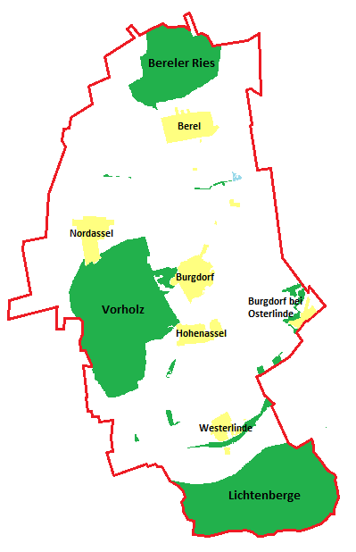 Lagekarte der Ortsteile innerhalb Gemeinde Burgdorf